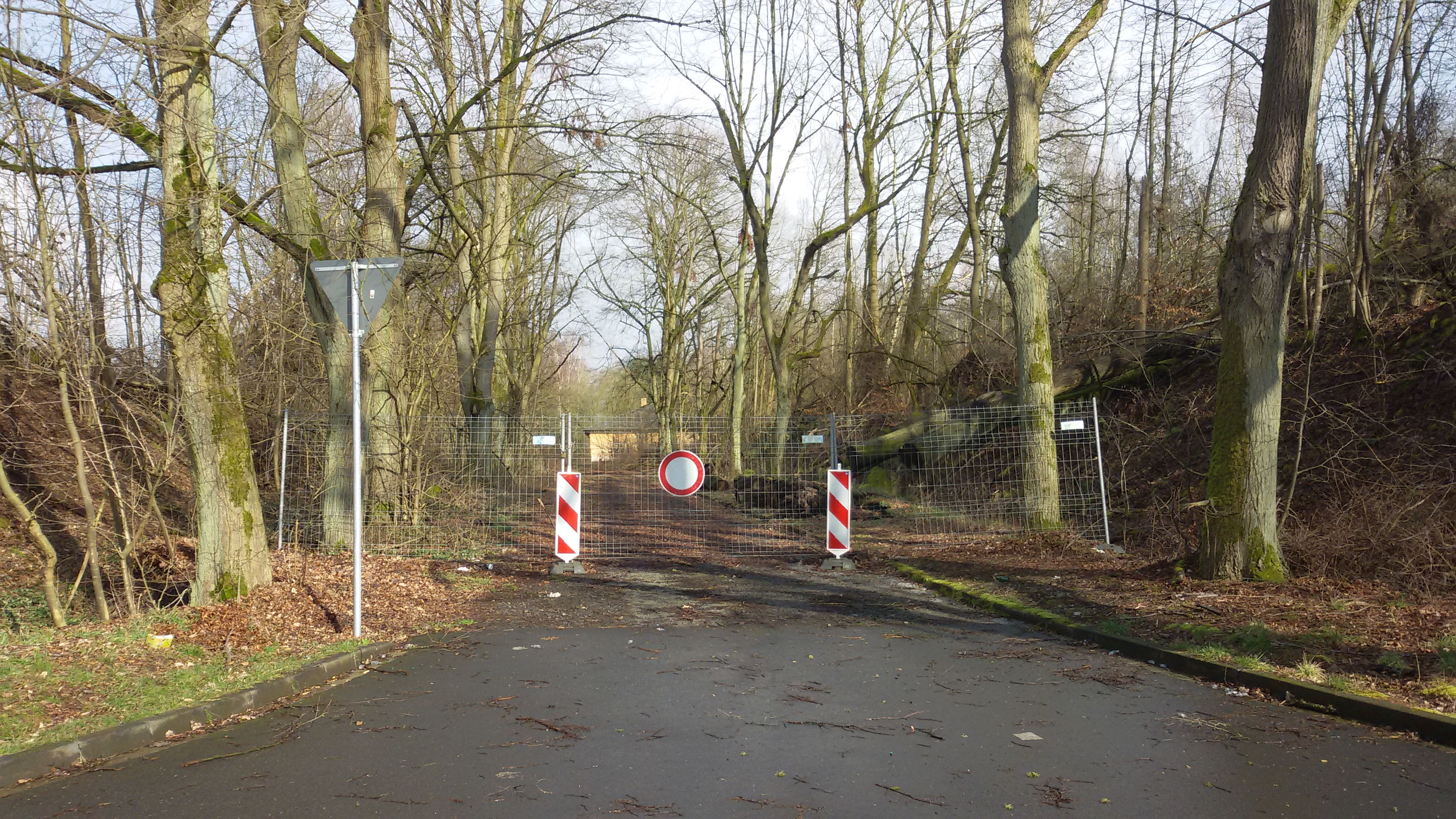 Auf diesem Foto, aufgenommen am 06.03.2016, ist der von der Bahnhofstraße in Waldkappel abzweigende Zufahrtsweg (gegenüber vom städtischen Bauhof) zum Bahnhofsgelände, welcher mit Baustellenzäunen abgesperrt ist, zu sehen.